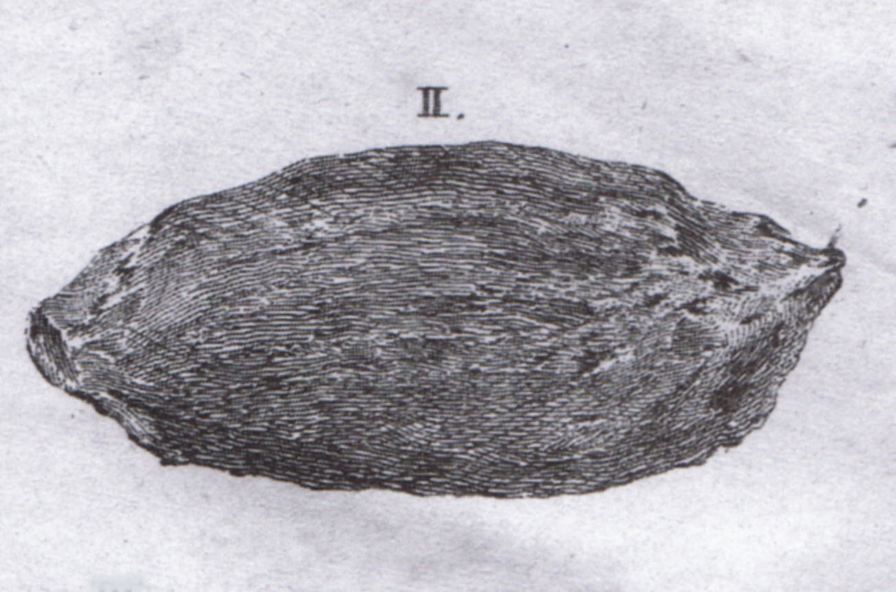 Zeichnung eines Klumpens Ambra, Kupferstich von 1753